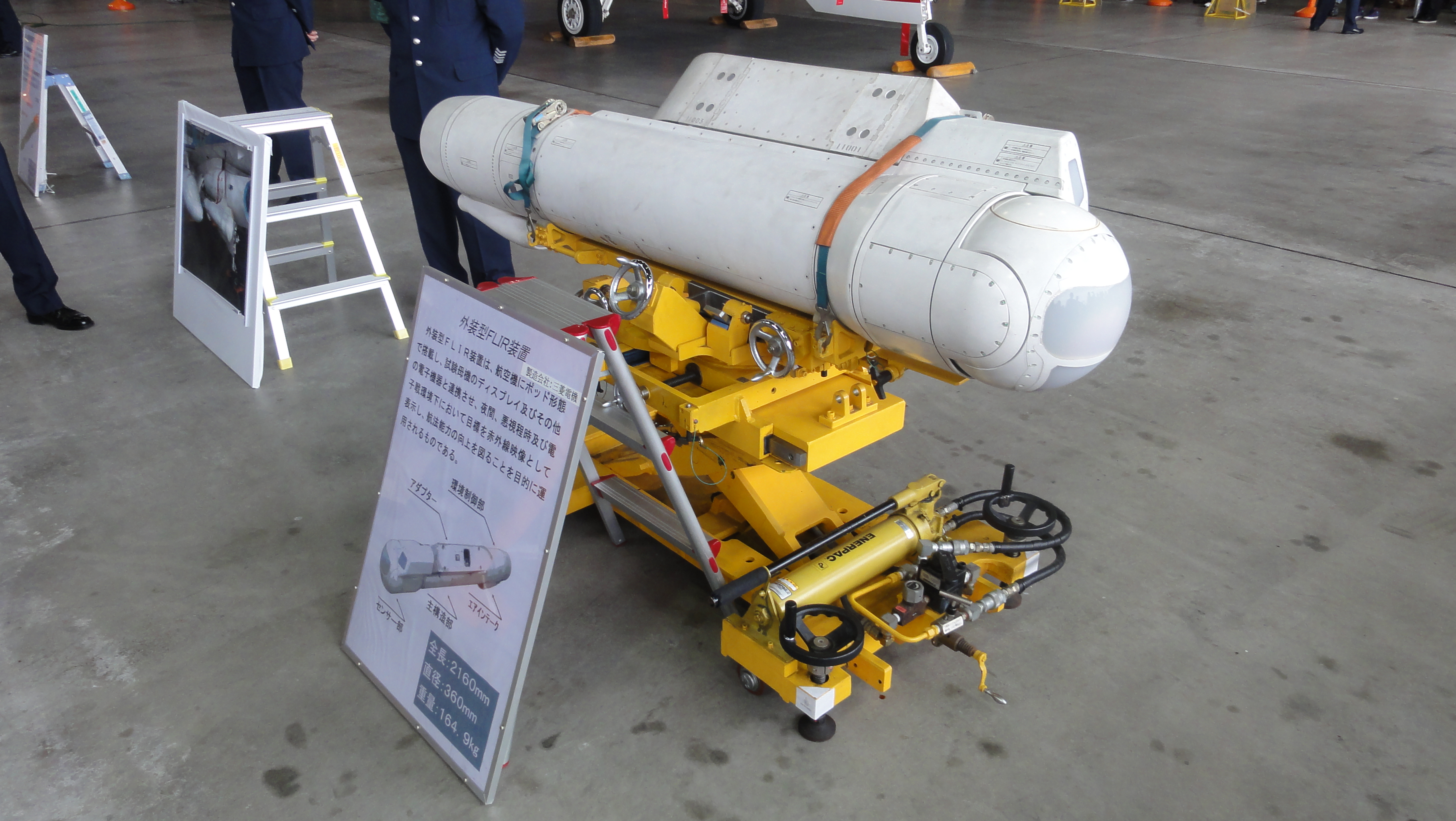 航空自衛隊F-2用J/AAQ-2赤外線前方監視装置、2012年10月28日航空自衛隊岐阜基地にて。